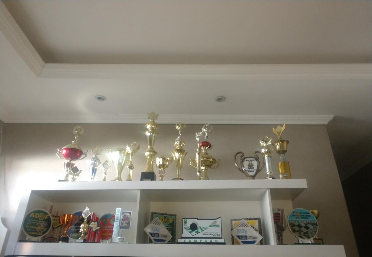 Diversos Troféus conquistados